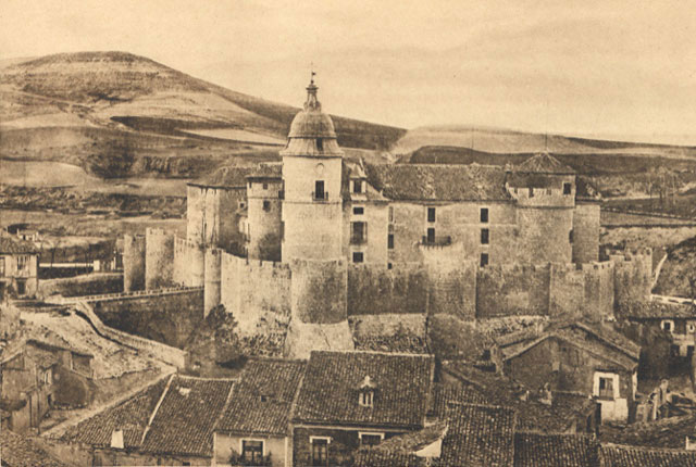 Castillo. Archivo Histórico General - Simancas (Valladolid) - Heliotipia Artística Española. Recuerdos Artísticos e Históricos de la Provincia. Fotos Gilardi. Vista de la antigua Villa, descollante el archivo histórico de España por designio del Emperador Carlos V. - Impresión. Papel 170 x 115 Sepia